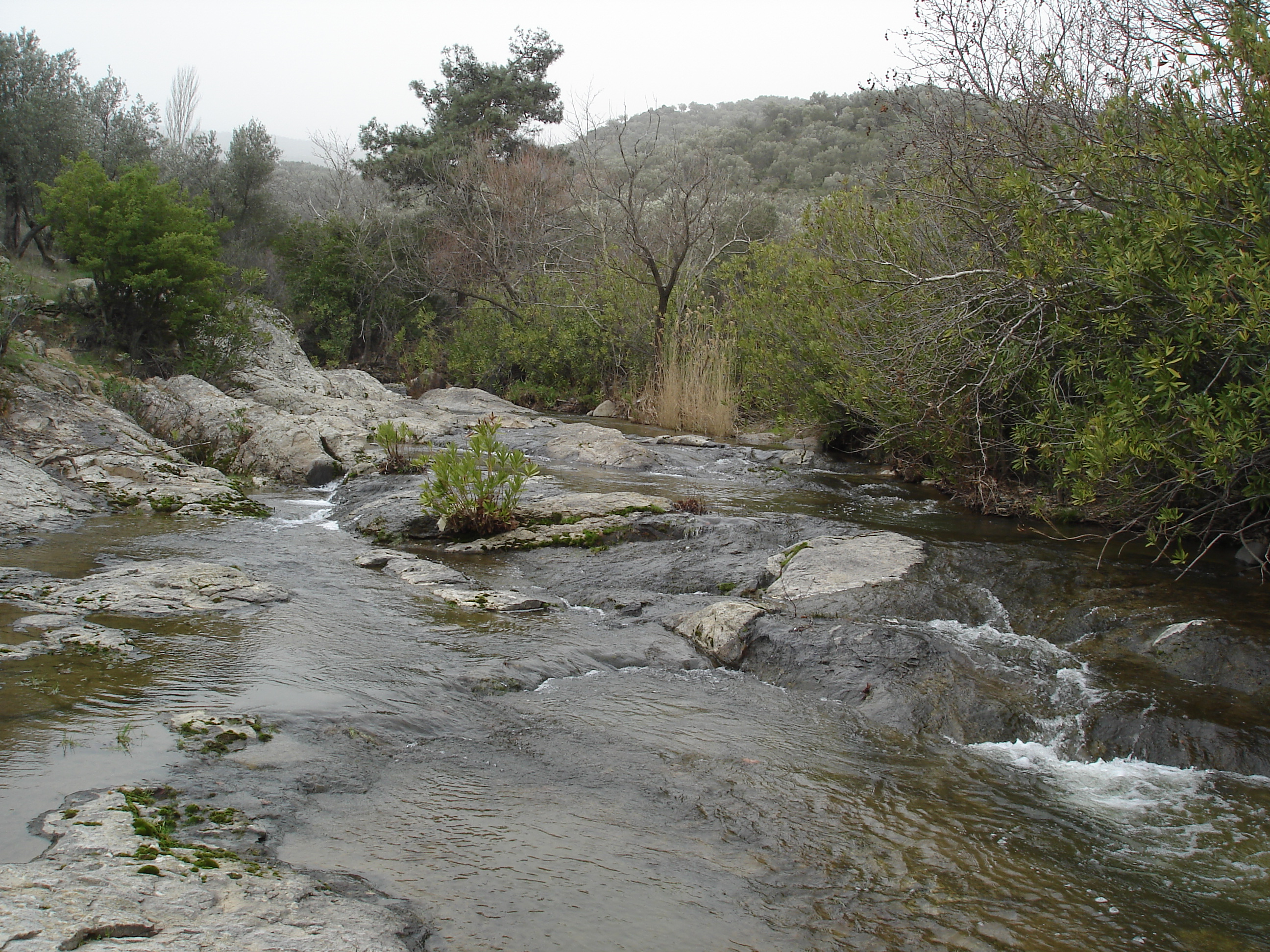 Potamia, river in Skala Kalloni, Lesbos, Greece